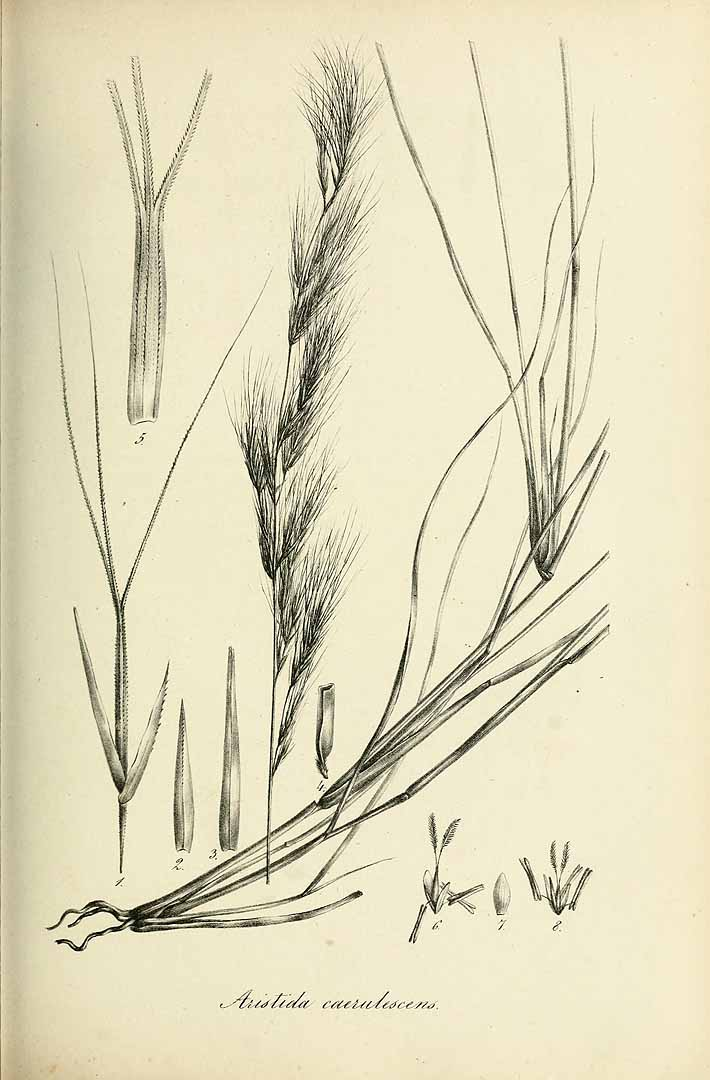 Aristida caerulescens Desf.